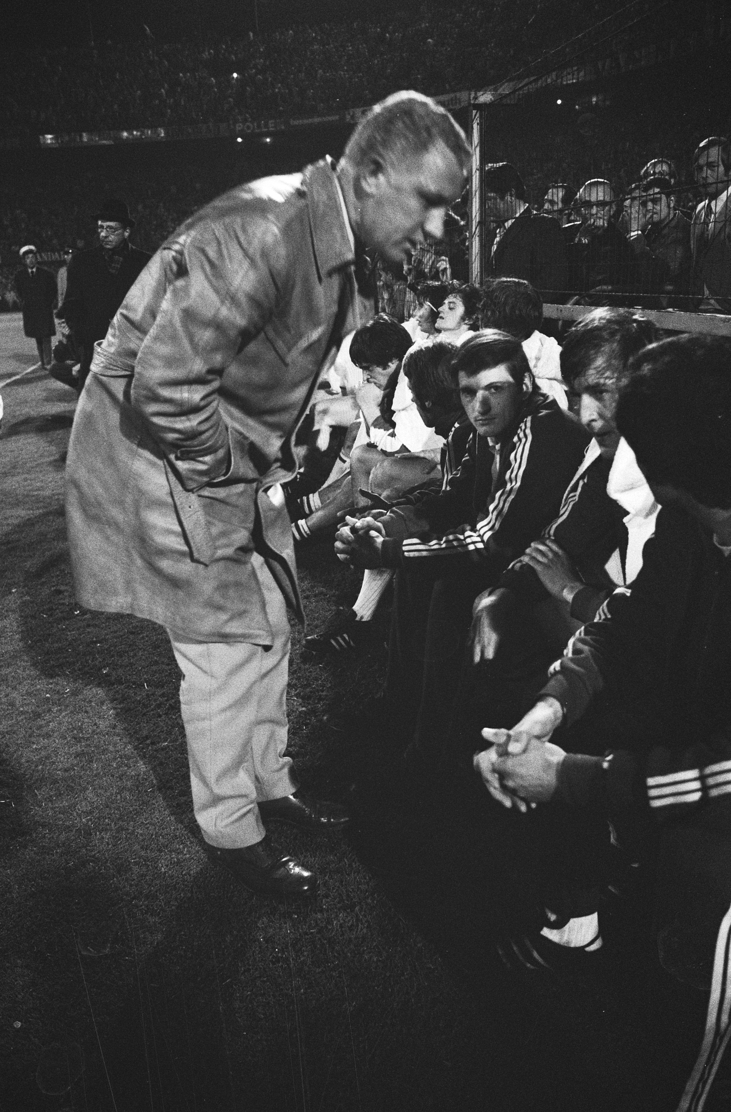 Collectie / Archief : Fotocollectie Anefo Reportage / Serie : Voetbalwedstrijd finale KNVB beker, Ajax - Sparta: 2-2 Beschrijving : Trainer van Sparta Georg Kessler praat met zijn spelers in de rust voor de verlenging Datum : 5 mei 1971 Locatie : Rotterdam, Zuid-Holland Trefwoorden : sport, voetbal Persoonsnaam : Kessler, Georg Fotograaf : Fotograaf Onbekend / Anefo Auteursrechthebbende : Nationaal Archief Materiaalsoort : Negatief (zwart/wit) Nummer archiefinventaris : bekijk toegang 2.24.01.05 Bestanddeelnummer : 924-5204